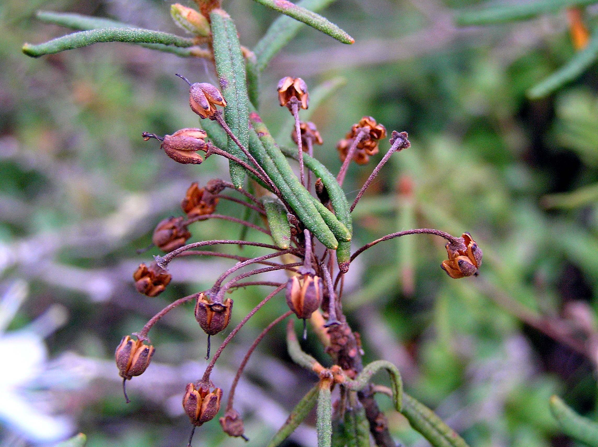 Sookailu õisik pärast õitsemist ja viljade teke